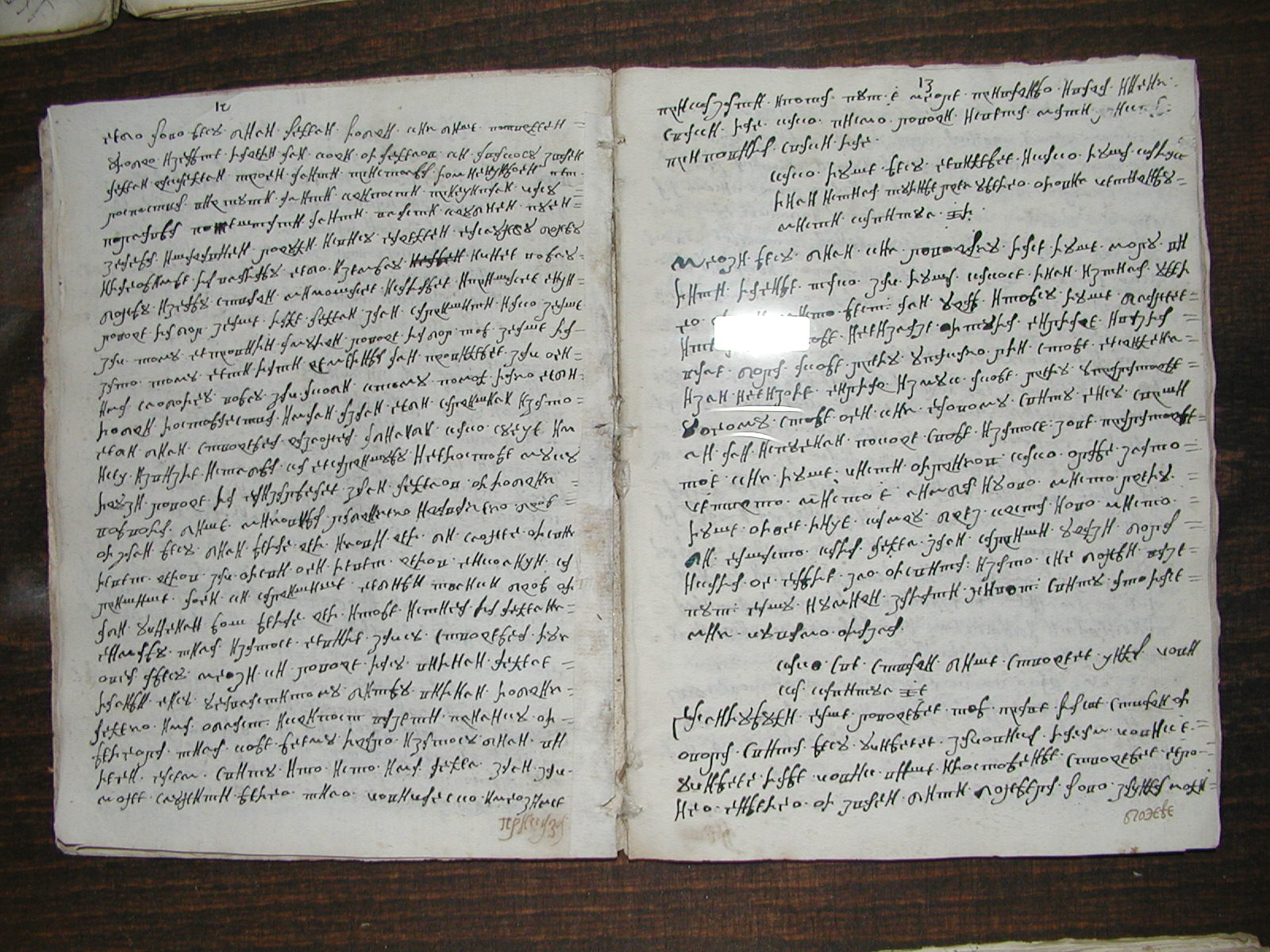 Alte Schrift in der Eremitage Blaca (Insel Brač, Kroatien). Das Museum zeigt heute eine beachtliche Sammlung alter Bücher und Schriften aus der gesamten Geschichte der Eremitage.